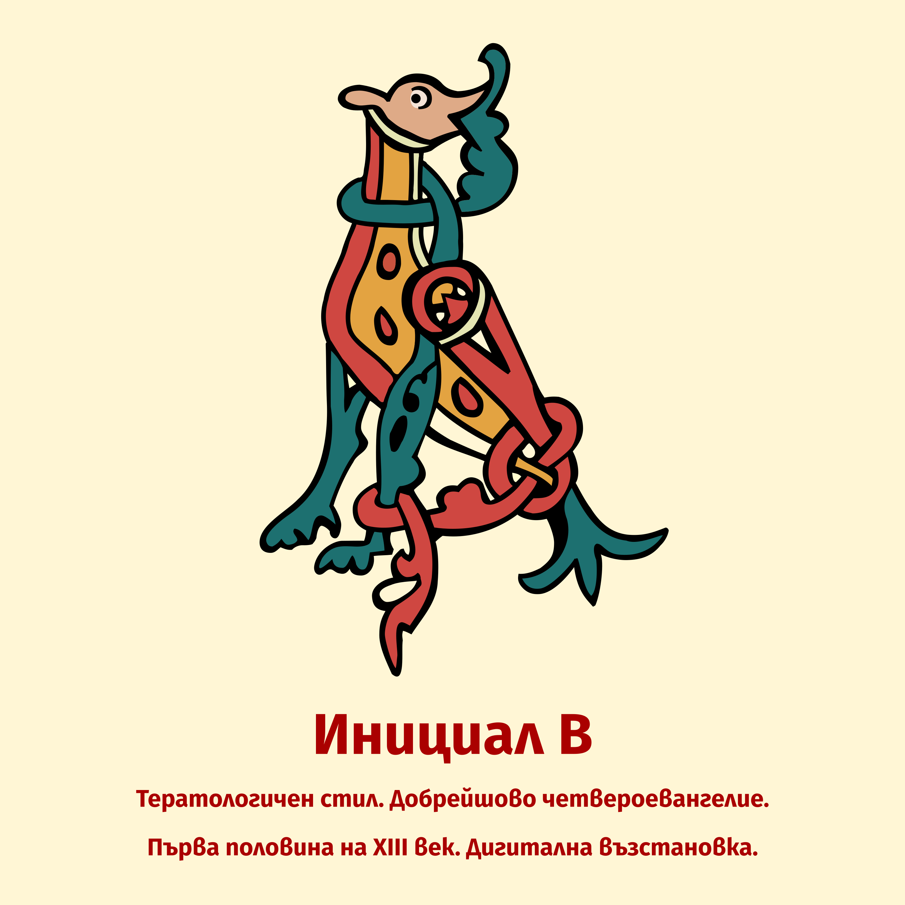 Инициал В. Тератологичен стил. Добрейшово четвероевангелие. Първа половина на XIII в.